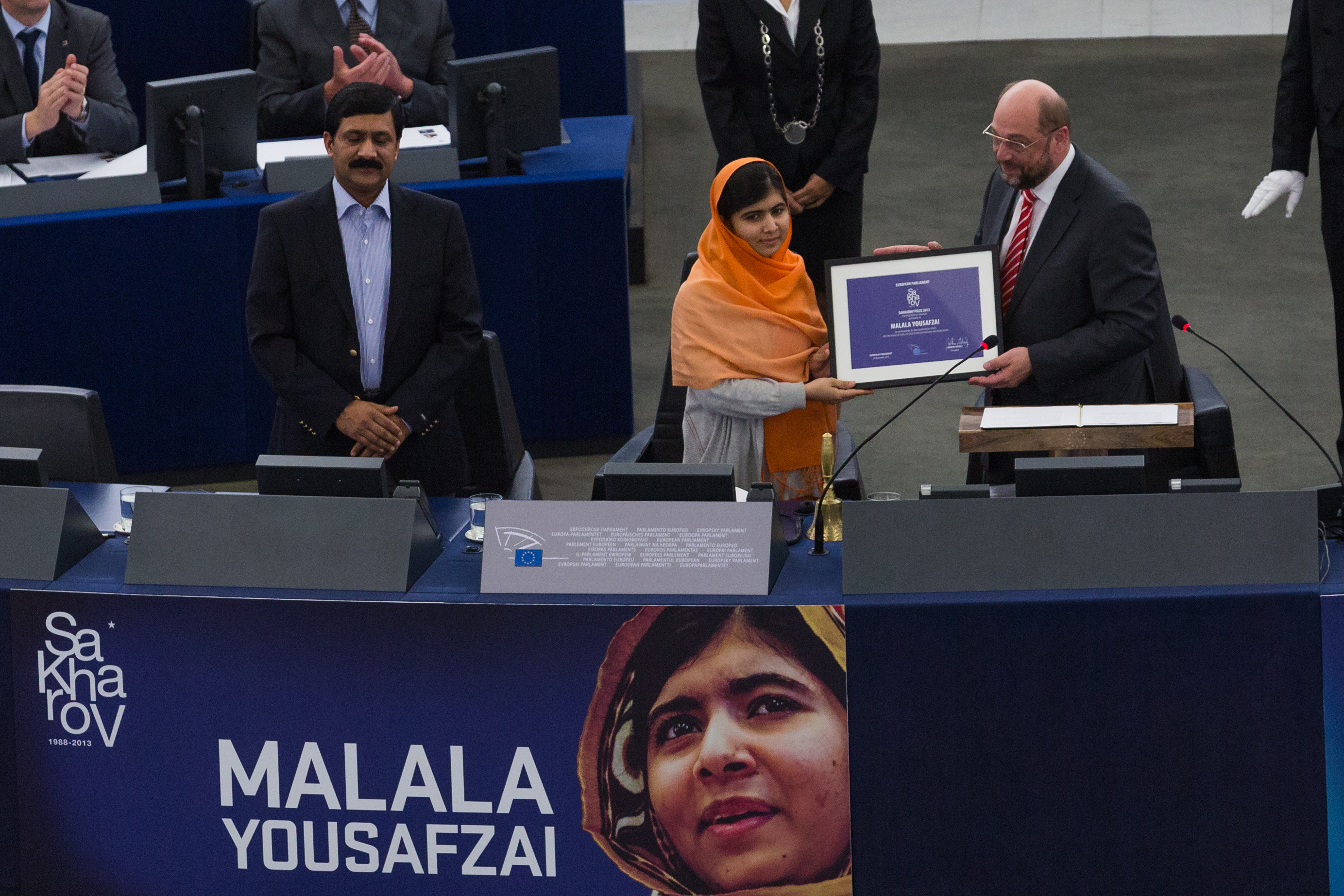 Depicted people: Ziauddin Yousafzai, Malala Yousafzai and Martin Schulz